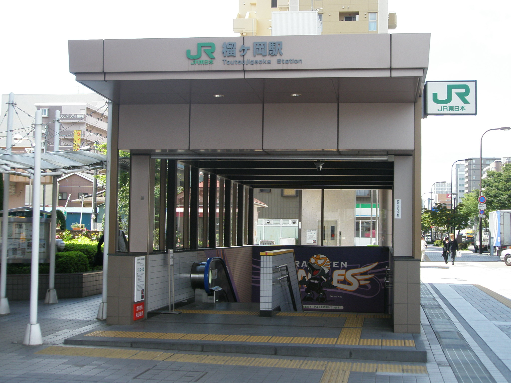 仙石線・榴ヶ岡駅入口（仙台市宮城野区）。楽天イーグルスの本拠地、宮城球場から比較的近いことから（最寄りは1つ隣の宮城野原駅）、同球団の非公式マスコット「Mr.カラスコ」が描かれている。宮城野原駅がえんじ色を基調としているのに対し、こちらは紫色。